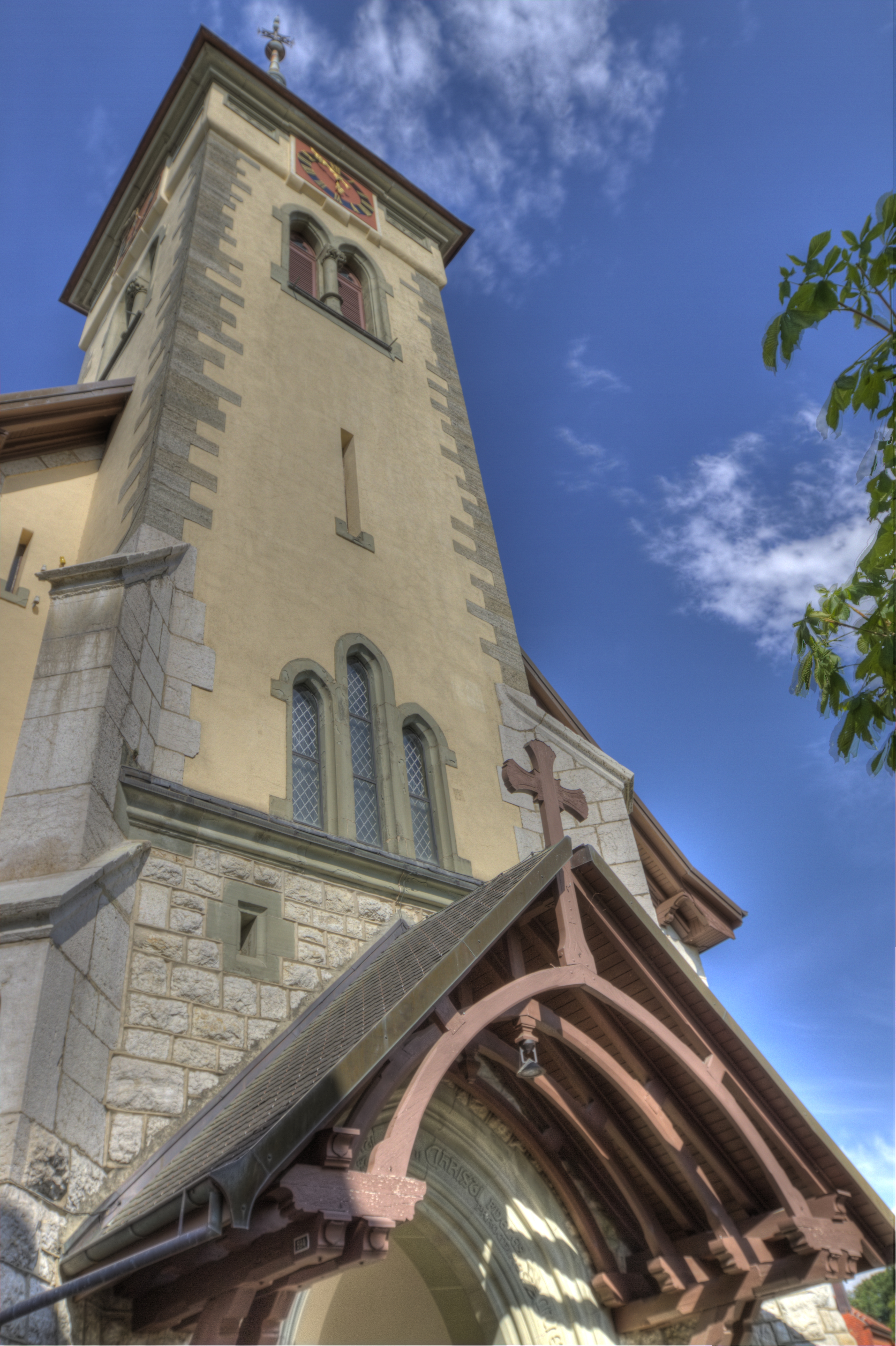 Eglise paroissiale de Cugy Fribourg, clocher